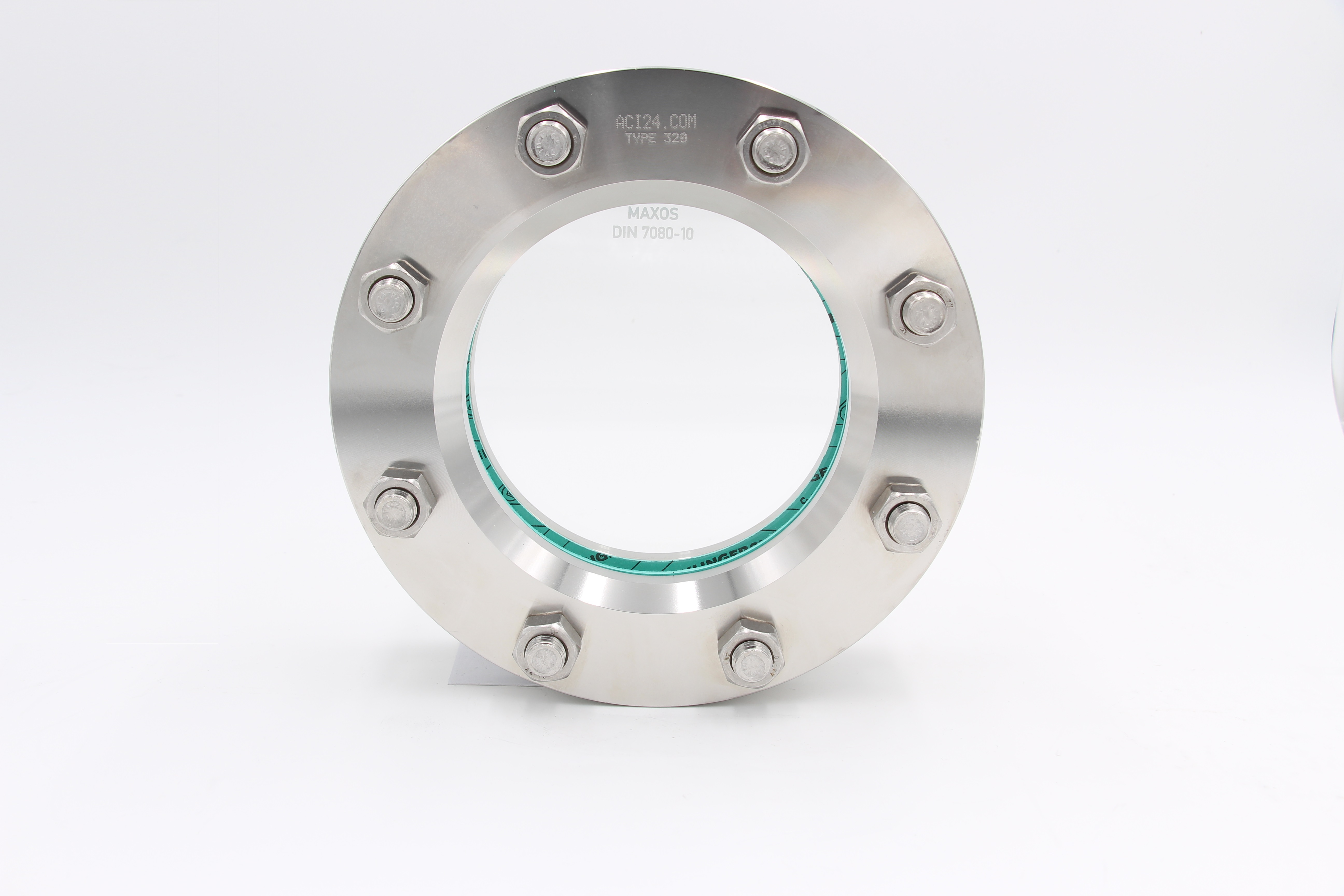 Das ACI Behälterschauglas Typ 320 ist ein rundes Behälterschauglas zum Ein- oder Aufschweißen, das komplett nach den Konstruktionsvorschriften der DIN 28120 gefertigt wird und für einen Betriebsdruck PN10/16 gefertigt wird.